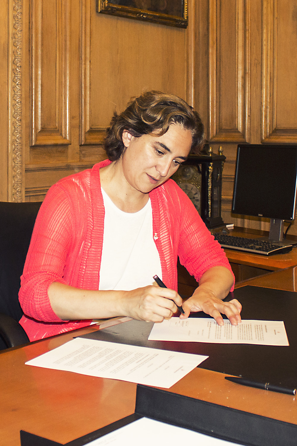 Plaça Sant Jaume 13/06/2015 Foto: Marc Lozano Investiture of Ada Colau, 14 June 2015, Barcelona